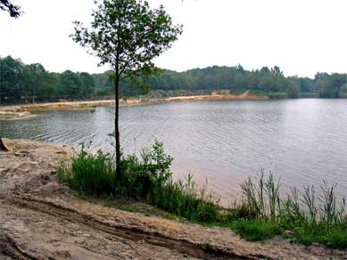 Het Ermerzand in de omgeving van Erm Categorie:Afbeelding Drenthe